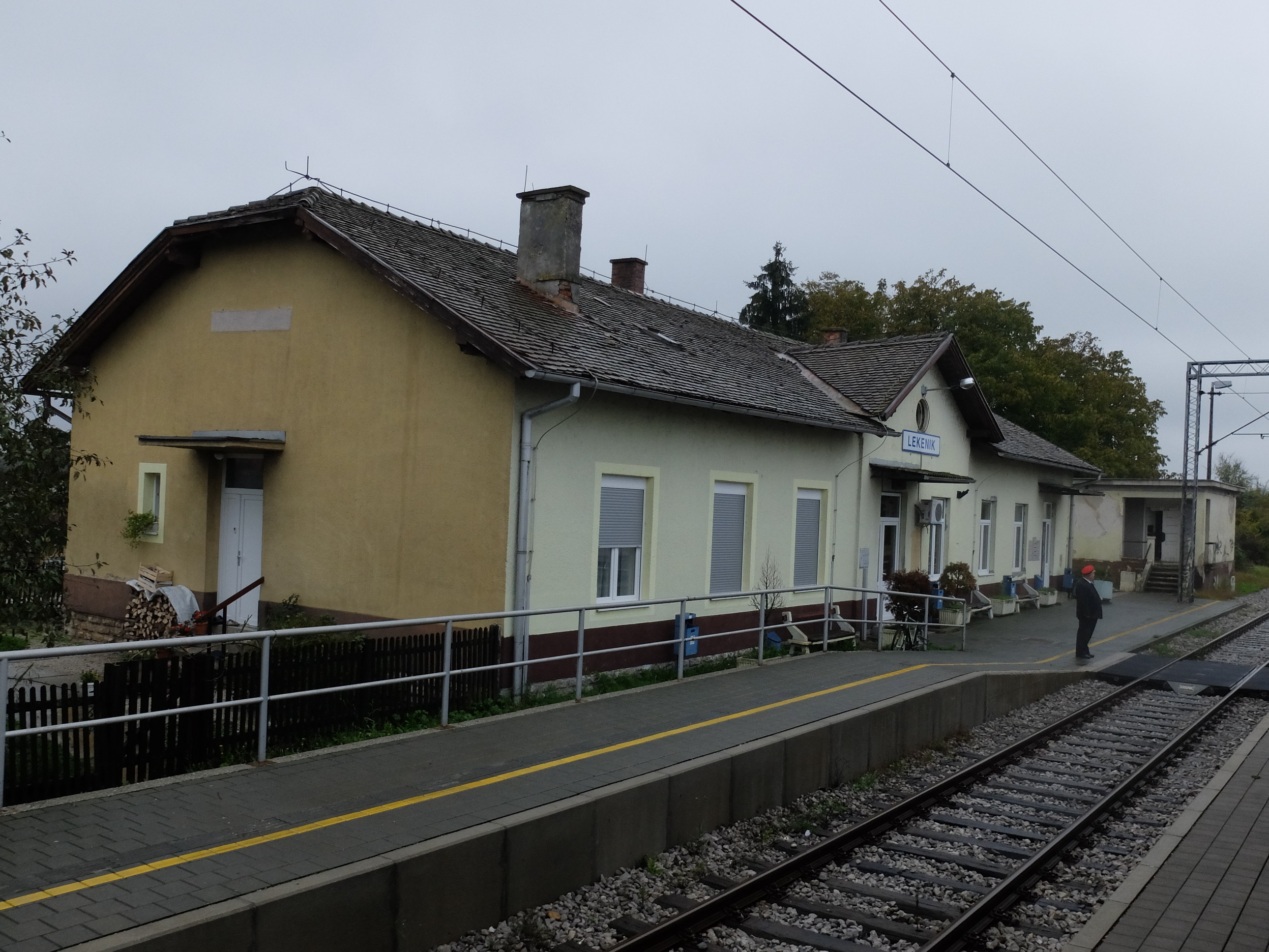 Lekenik (Kolodovor)